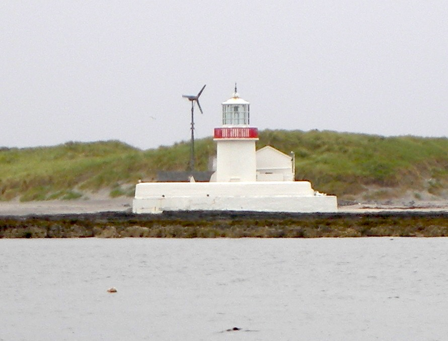 inishmore